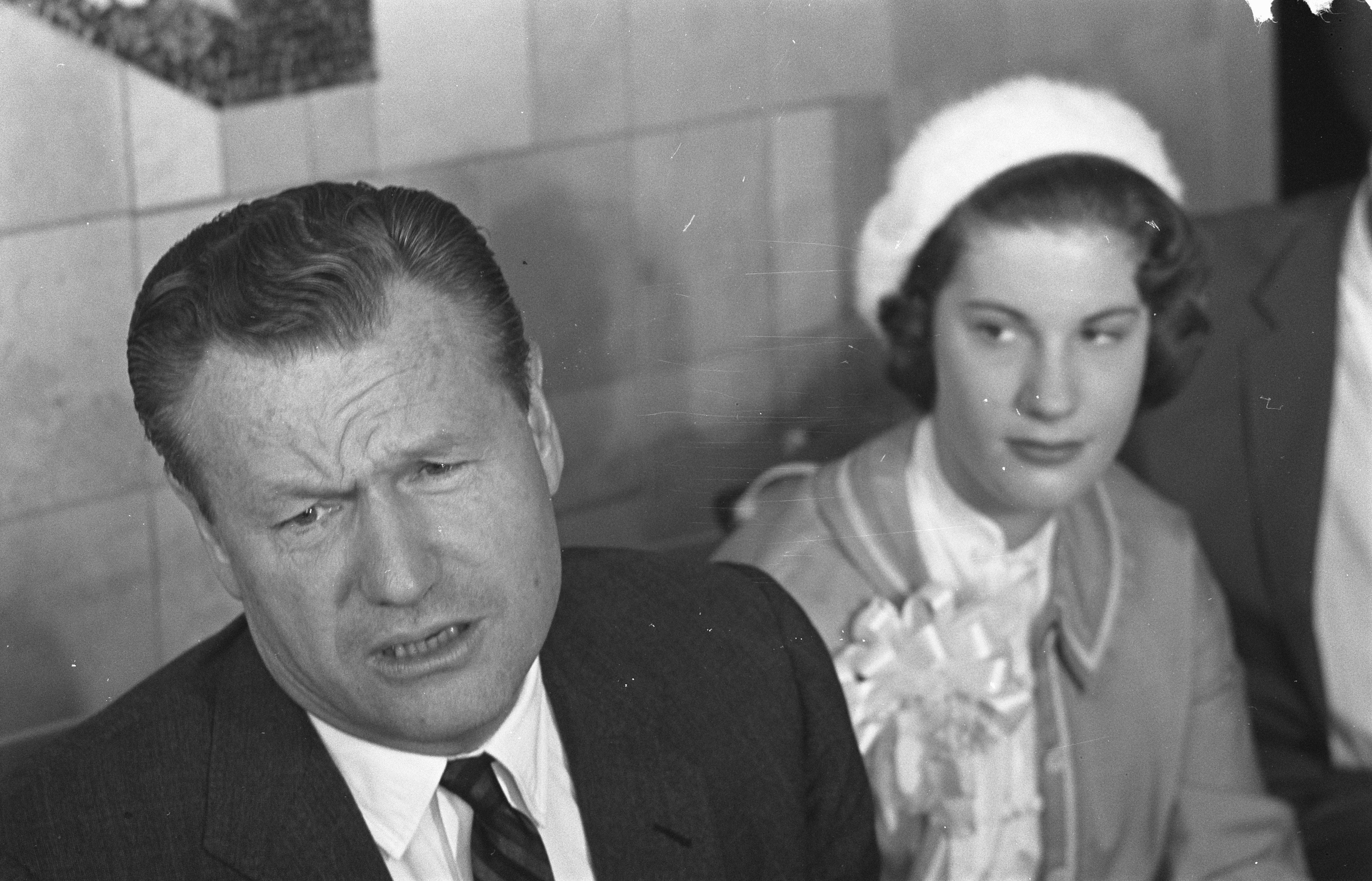 Collectie / Archief : Fotocollectie Anefo Reportage / Serie : [ onbekend ] Beschrijving : Aankomst Rockefeller op Schiphol tijdens doorreis naar Noorwegen, Rockefeller tijdens persconferentie Datum : 21 augustus 1959 Locatie : Noord-Holland, Schiphol Fotograaf : Pot, Harry / Anefo Auteursrechthebbende : Nationaal Archief Materiaalsoort : Negatief (zwart/wit) Nummer archiefinventaris : bekijk toegang 2.24.01.05 Bestanddeelnummer : 910-6195